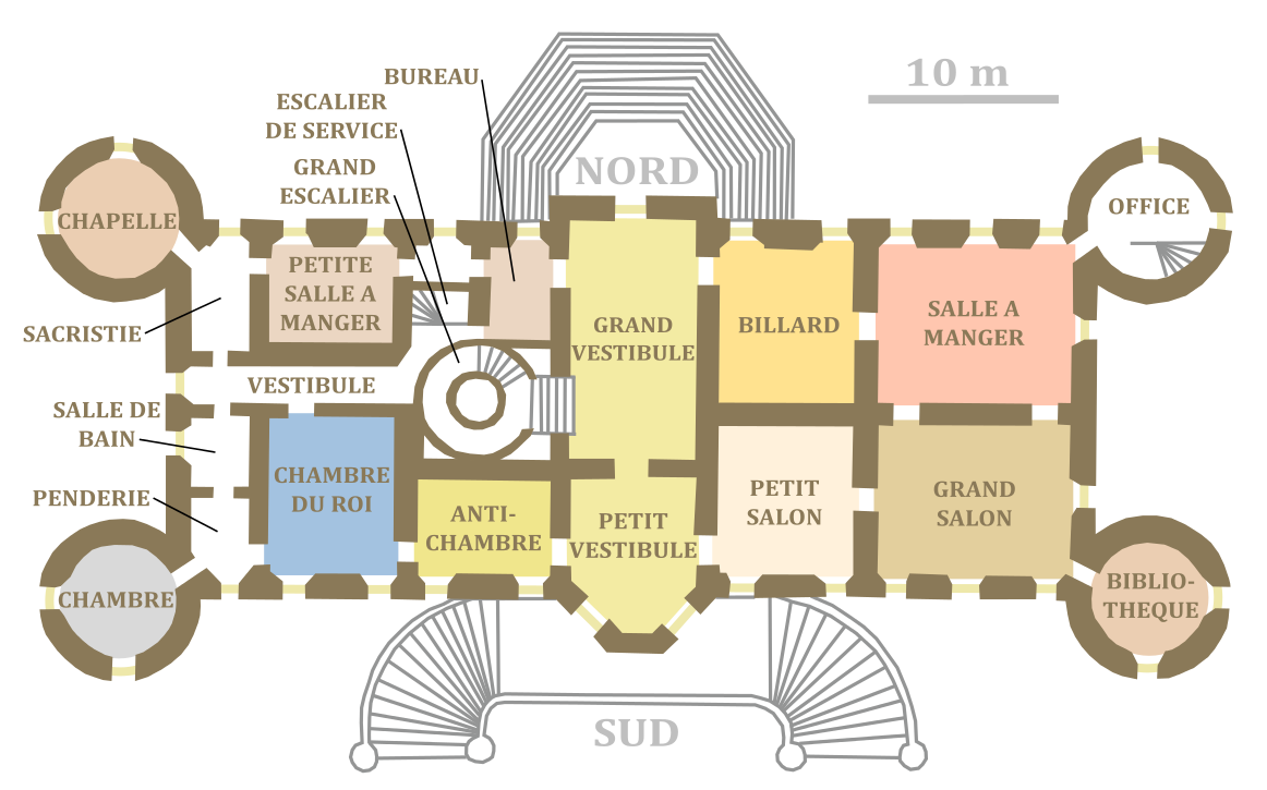 Plan de rez-de-chaussée du Château de Challain, Maine-et-Loire, France.